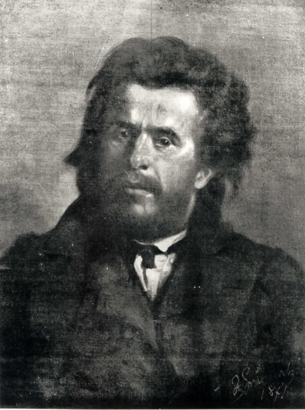 Antoni Kurzawa - portret autorstwa Andrzeja Grabowskiego olej na płótnie